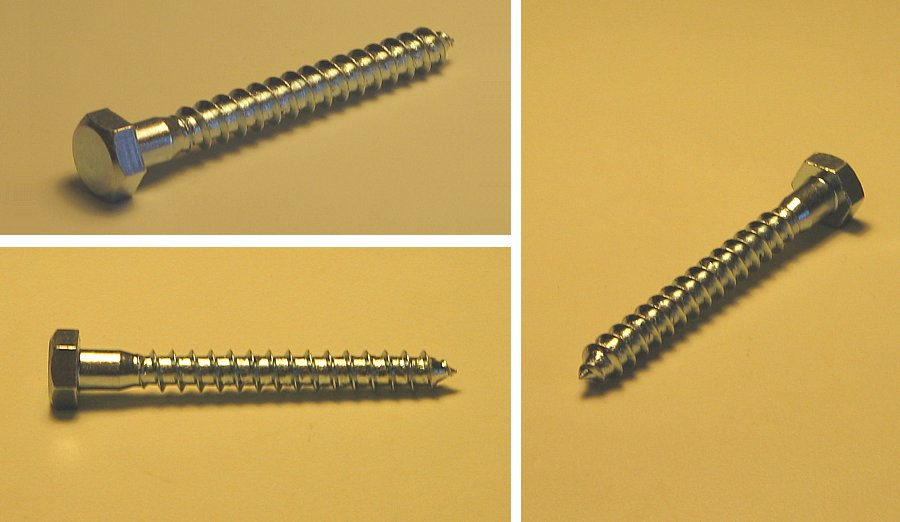 Bolto, destinita por esti ŝraŭbita en materialo, kiu antaŭe ne havis ŝraŭbecon. Mi, aŭtoro de la bildo, permesas al ĉiuj uzi ĝin kun ĉi tiaj kondiĉoj